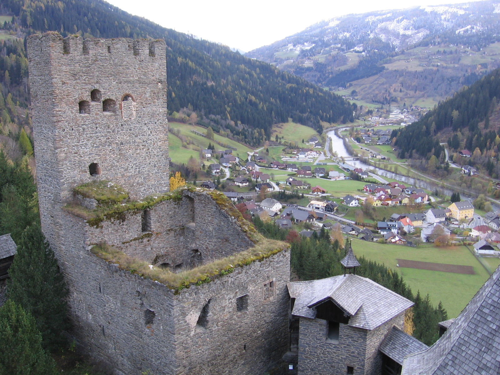 Ramingstein